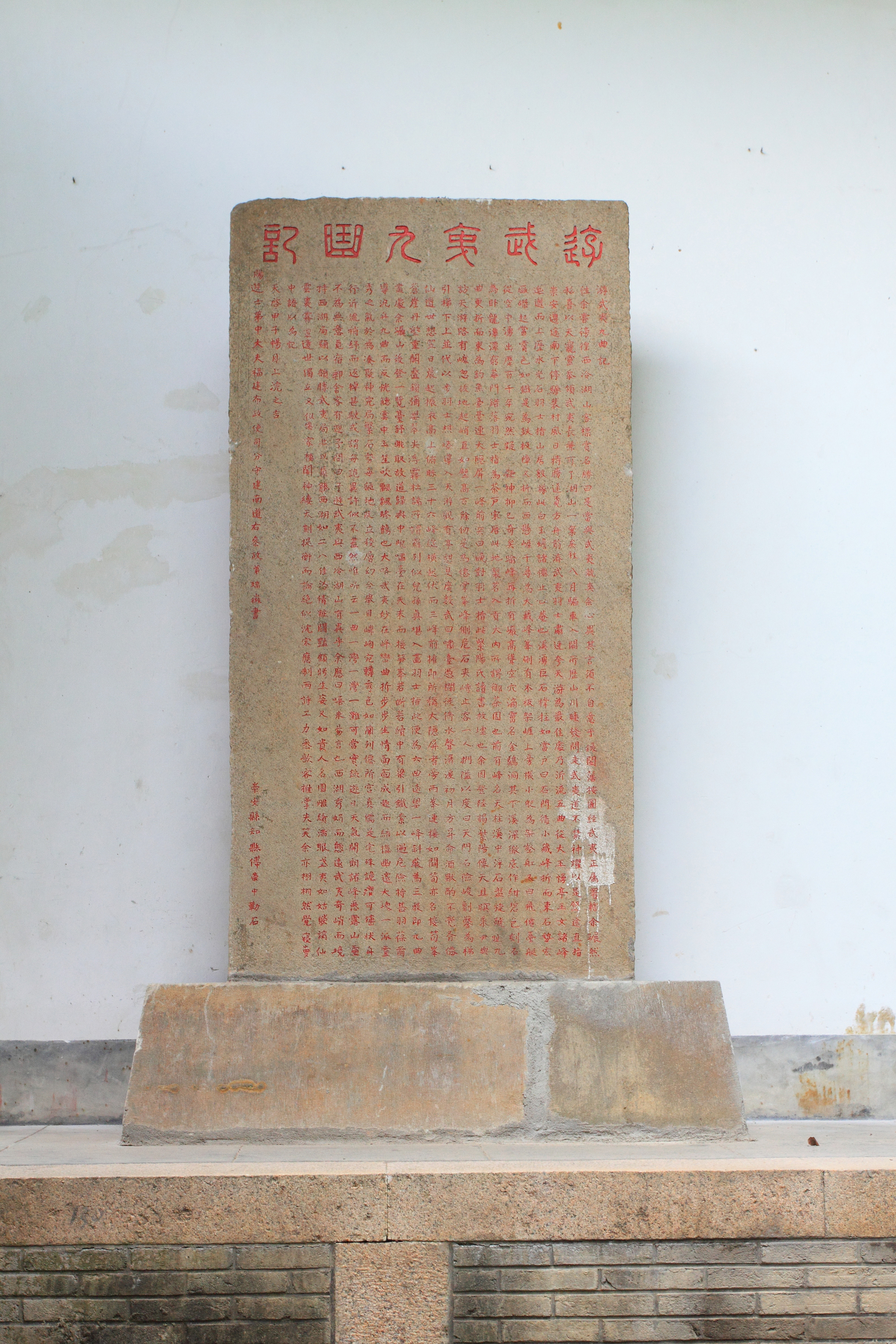 武夷宫藏碑刻——《游武夷九曲記》，天啟甲子年，賜進士第中大夫福建布政使司分守建南道右參政茅瑞徵書，崇安縣知縣傅崇中勒石